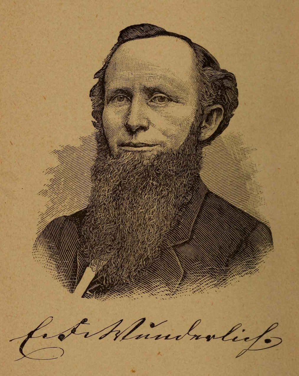 Erhardt Friedrich Wunderlich